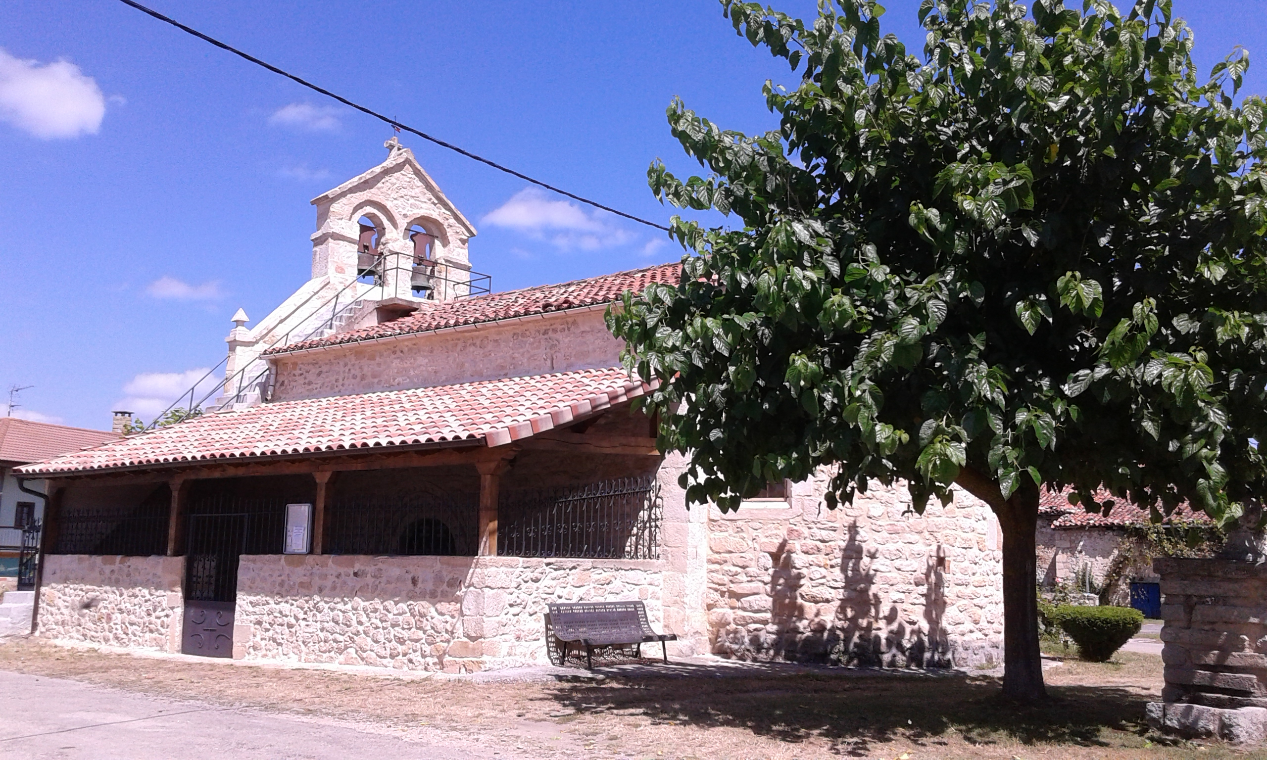 Iglesia parroquial románica